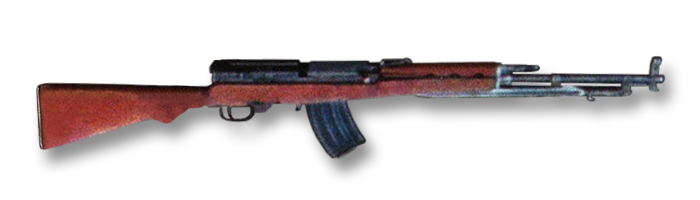 Sturmgewehr "Type 63" (China)